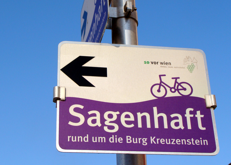 Schild des Radweg "Sagenhaft" in der Region 10 vor Wien